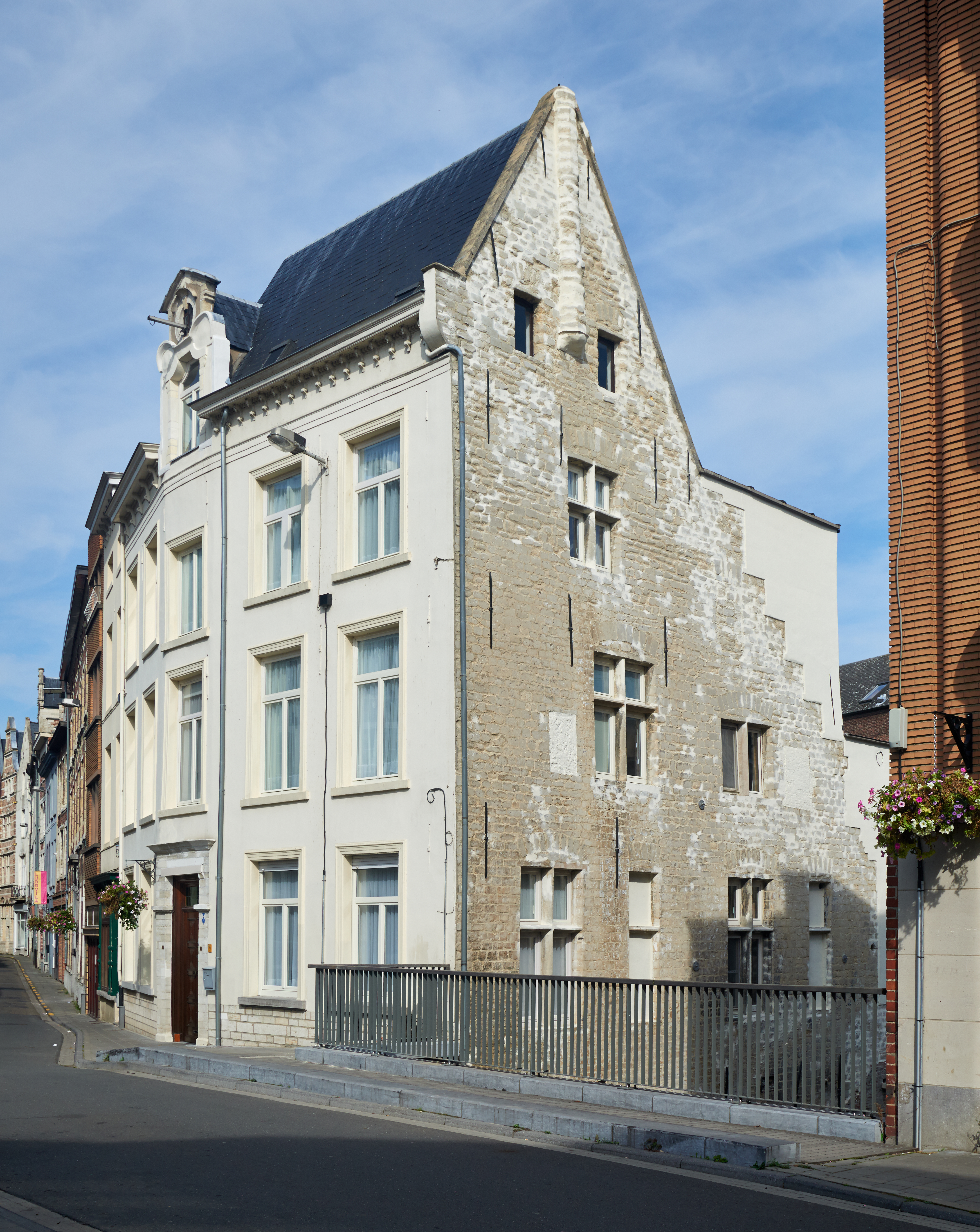 Leuven, Mechelsestraat 92